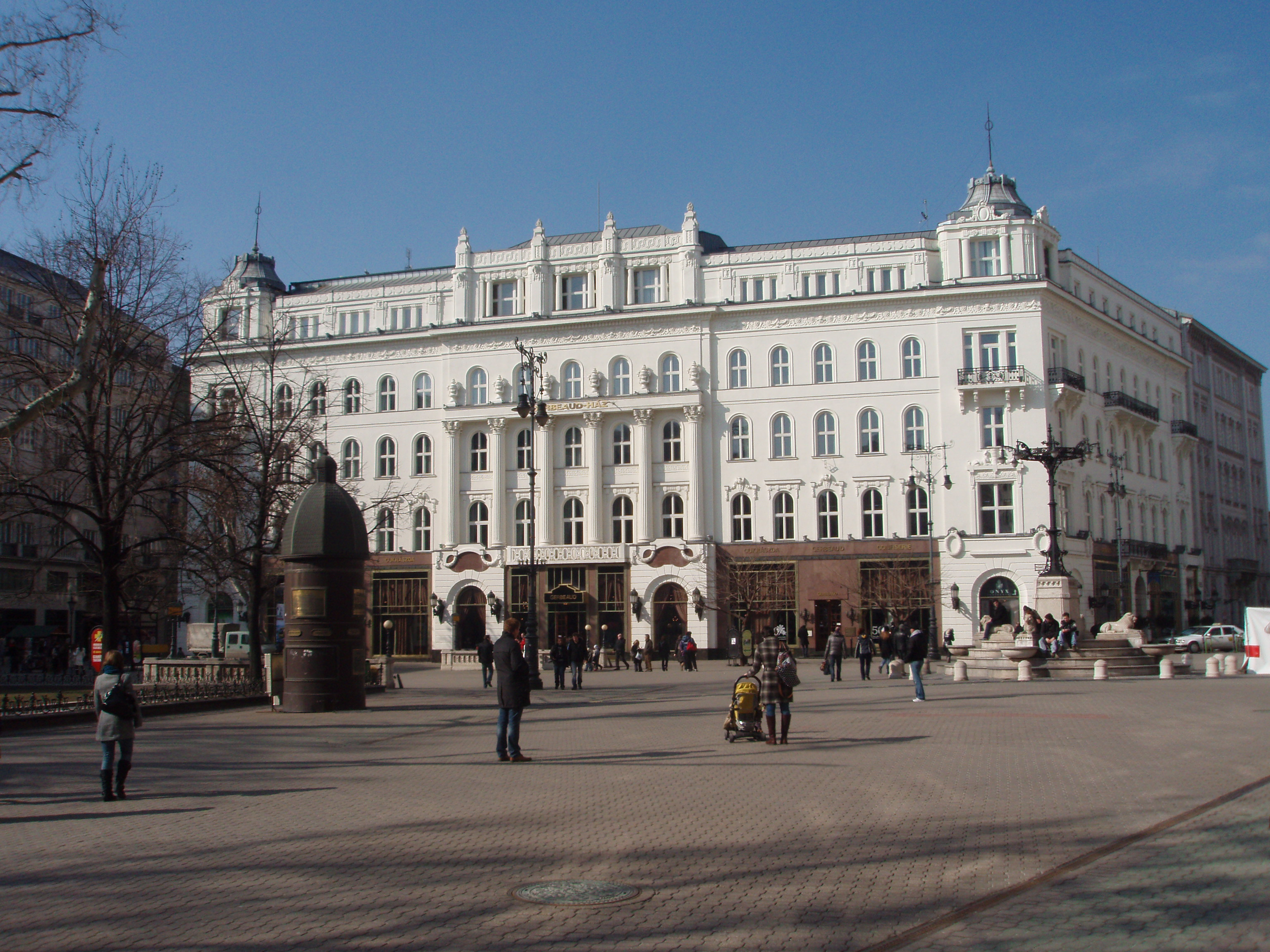 Zgrada kafea "Žerbo"